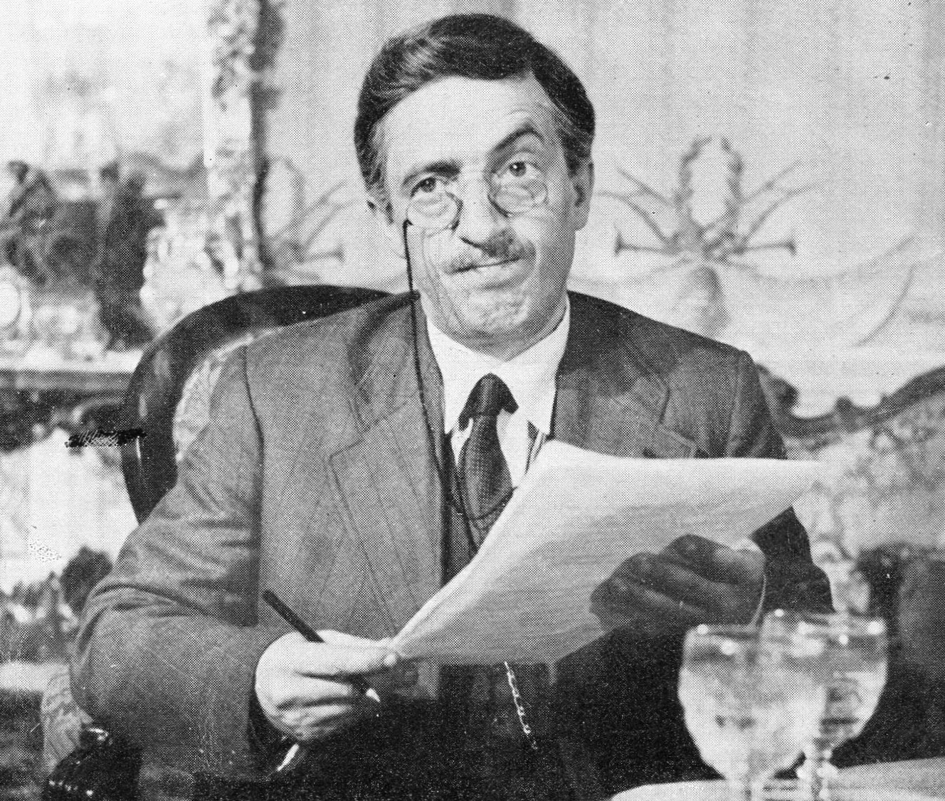 Nino Taranto in "Anni facili" (Zampa, 1953)